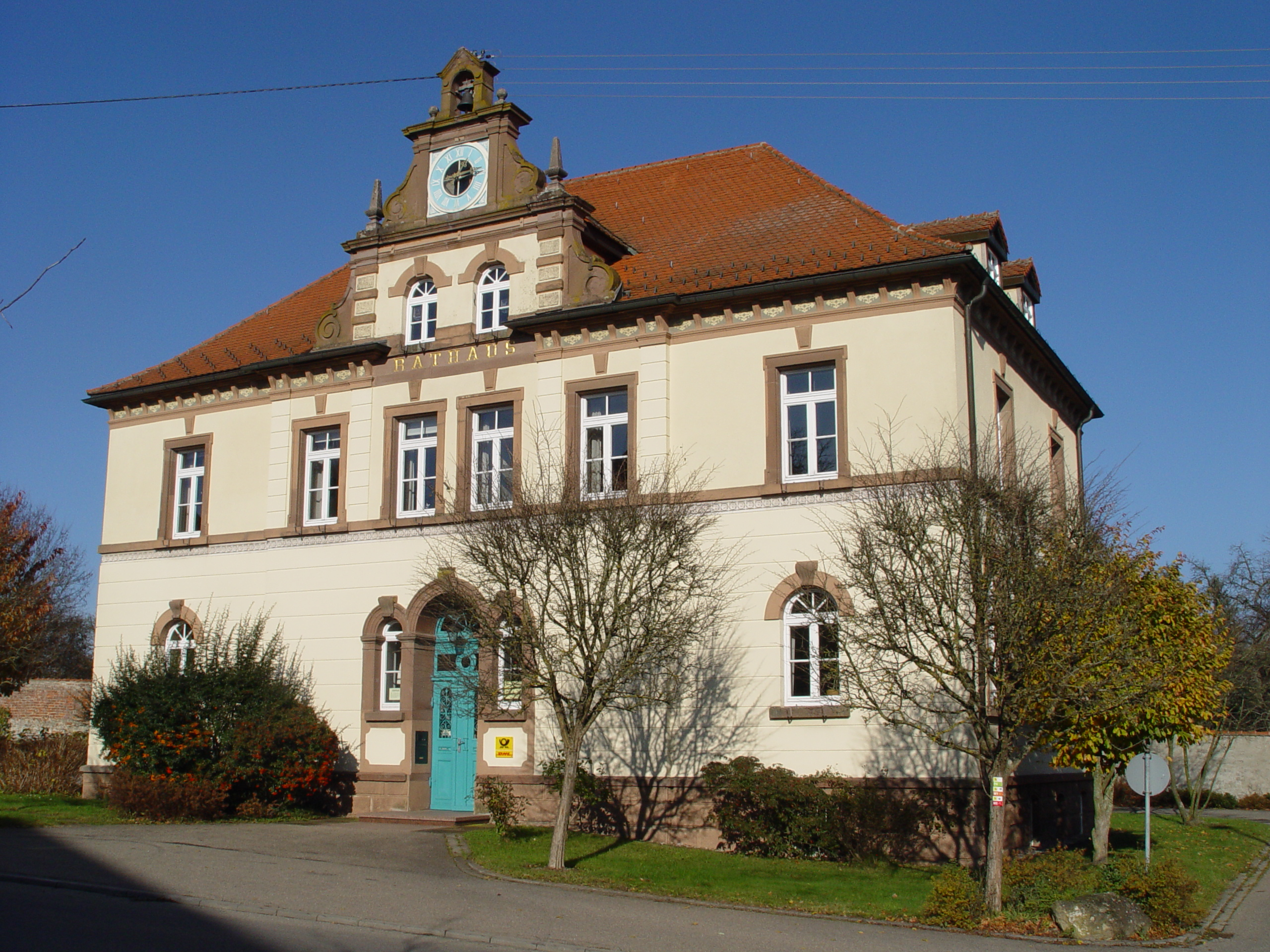 Bild selbst gemacht - own work Ehemaliges Schulhaus, heute Rathaus der Gemeinde Wald (Hohenzollern), Deutschland Photographed by : Zollernalb